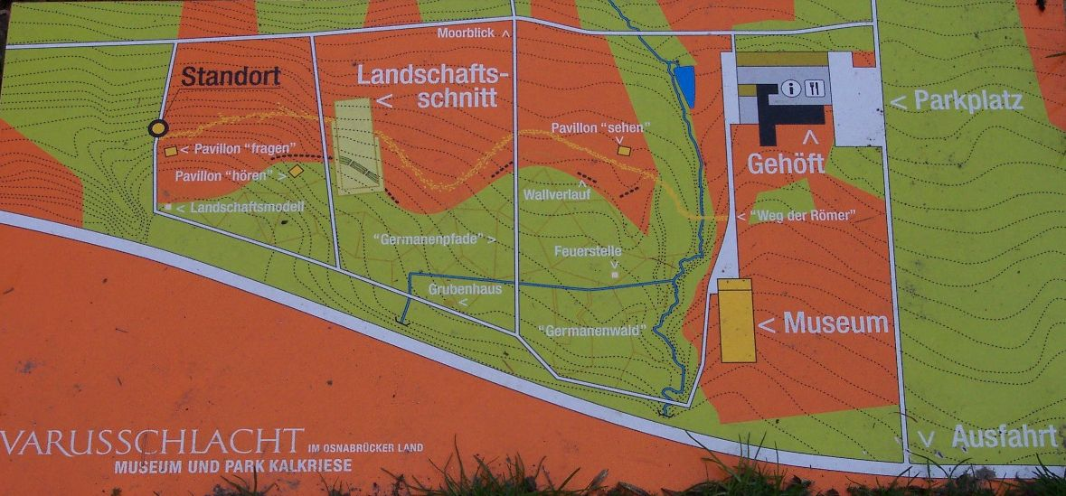 Übersichtstafel des Museums, eigenes Bild, GFDL